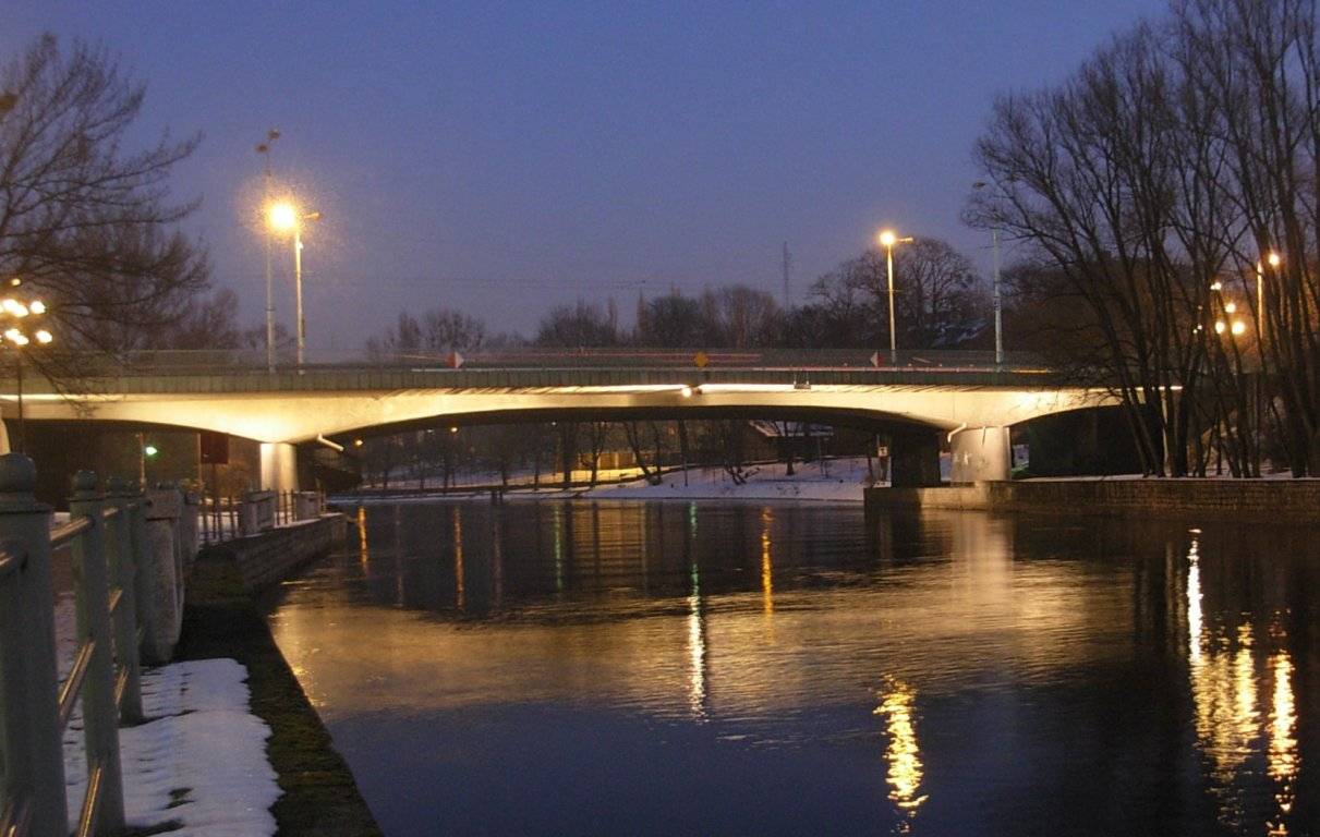 Most Bernardyński w Bydgoszczy